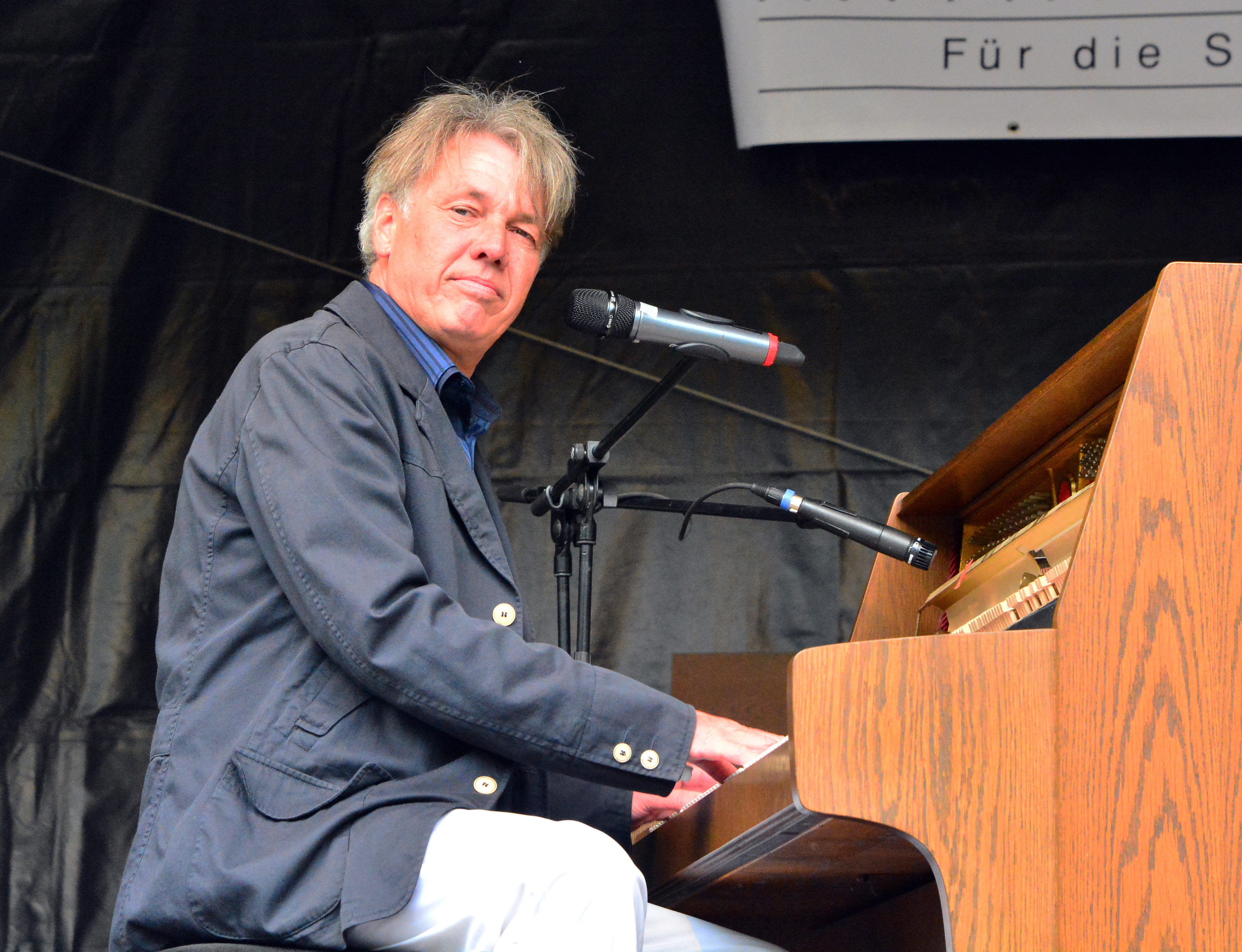 Jo Bohnsackbeim „Jazz 'n Roses 2015“ im Liether Rosengarten Elmshorn